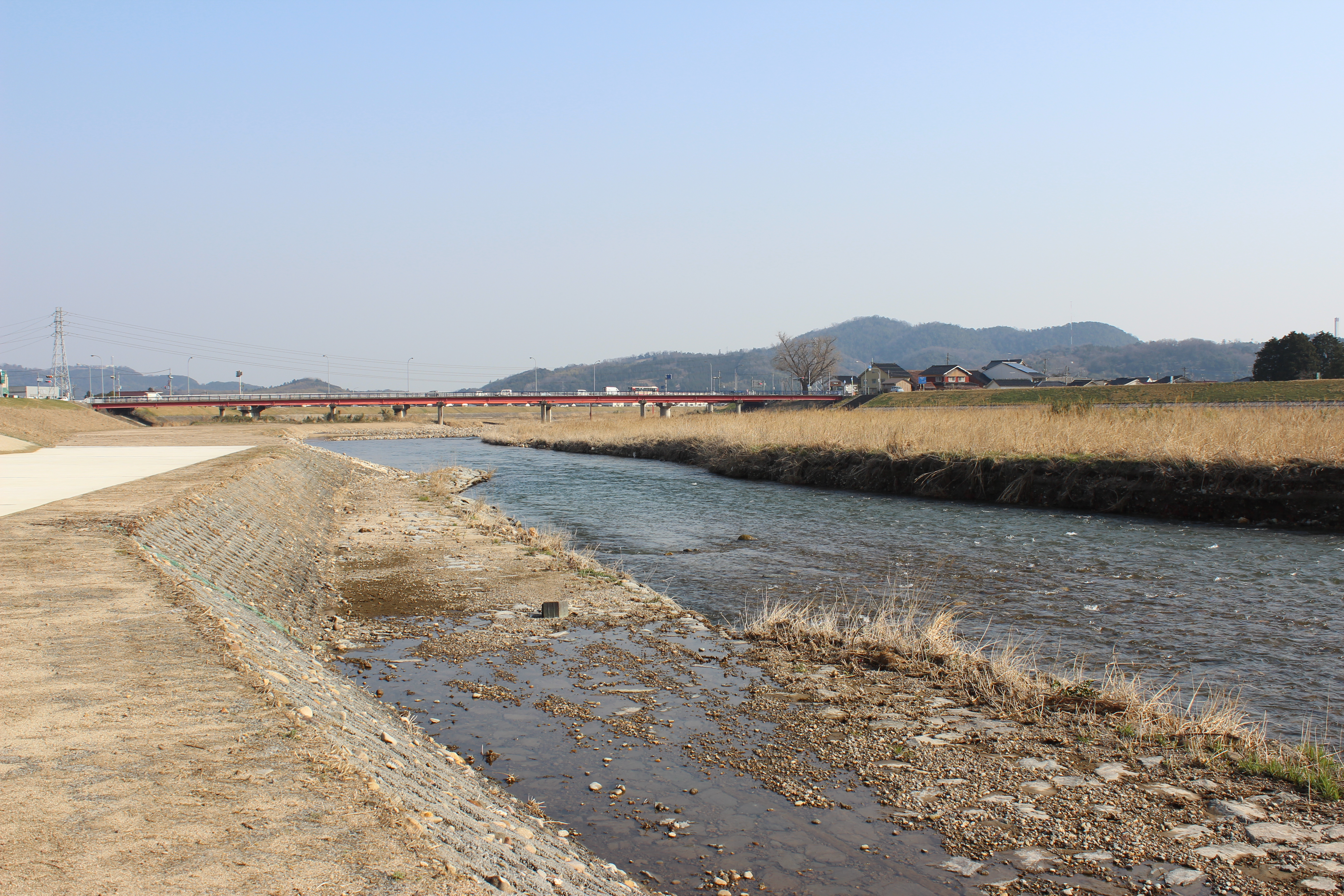 鳥取県倉吉市丸山付近。下流方向の小鴨橋を望む。